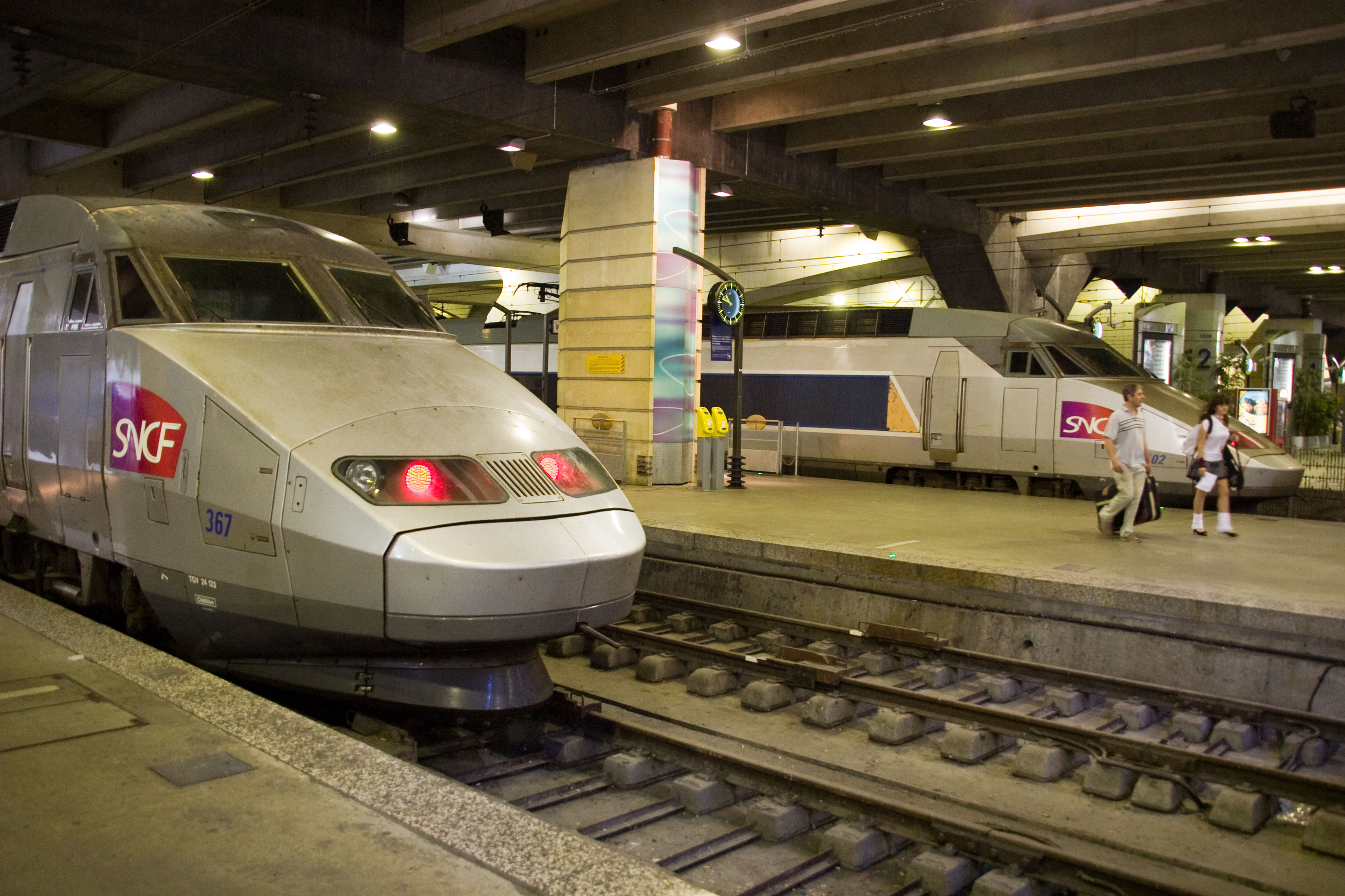 Gare de Paris-Montparnasse, Paris, France